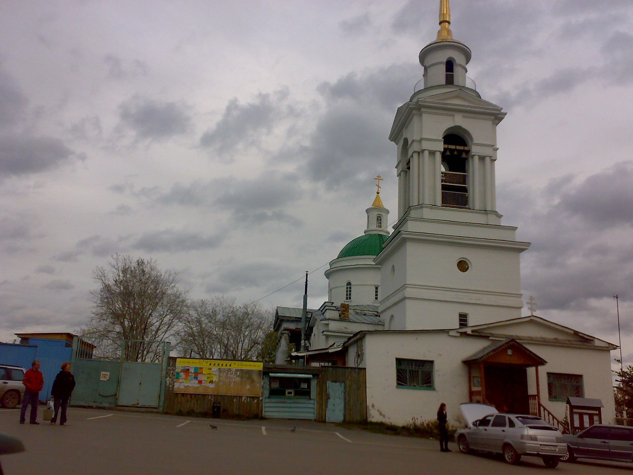 Свято-Троицкий храм (Арамиль)